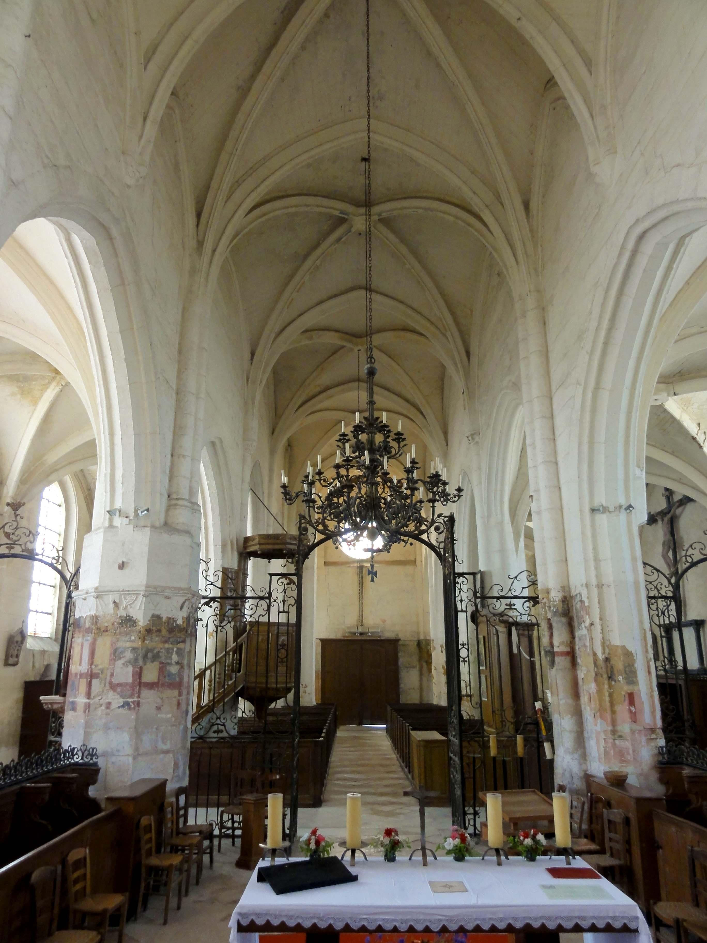 Intérieur de l'église (voir titre).